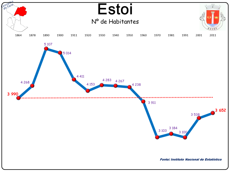 Censos 1864/2011